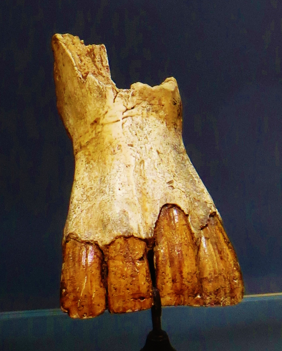 Fossil of Hipparion, an extinct mammal- Took the photo at Musee d'Histoire Naturelle, Paris